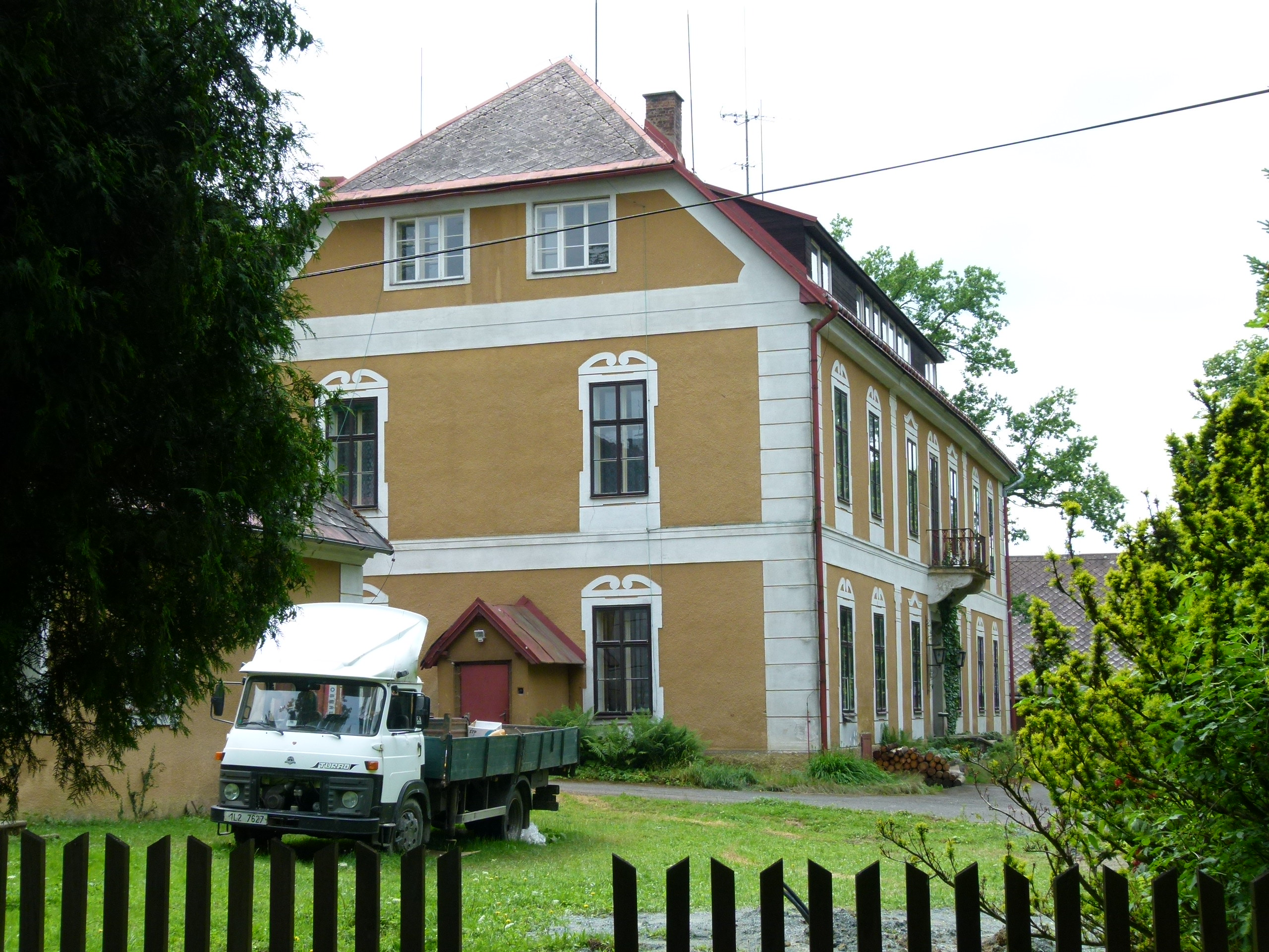 Zámek Navarov s parkem, s omezením: bez budovy čp. 10 Lhotka, Lhotka 1